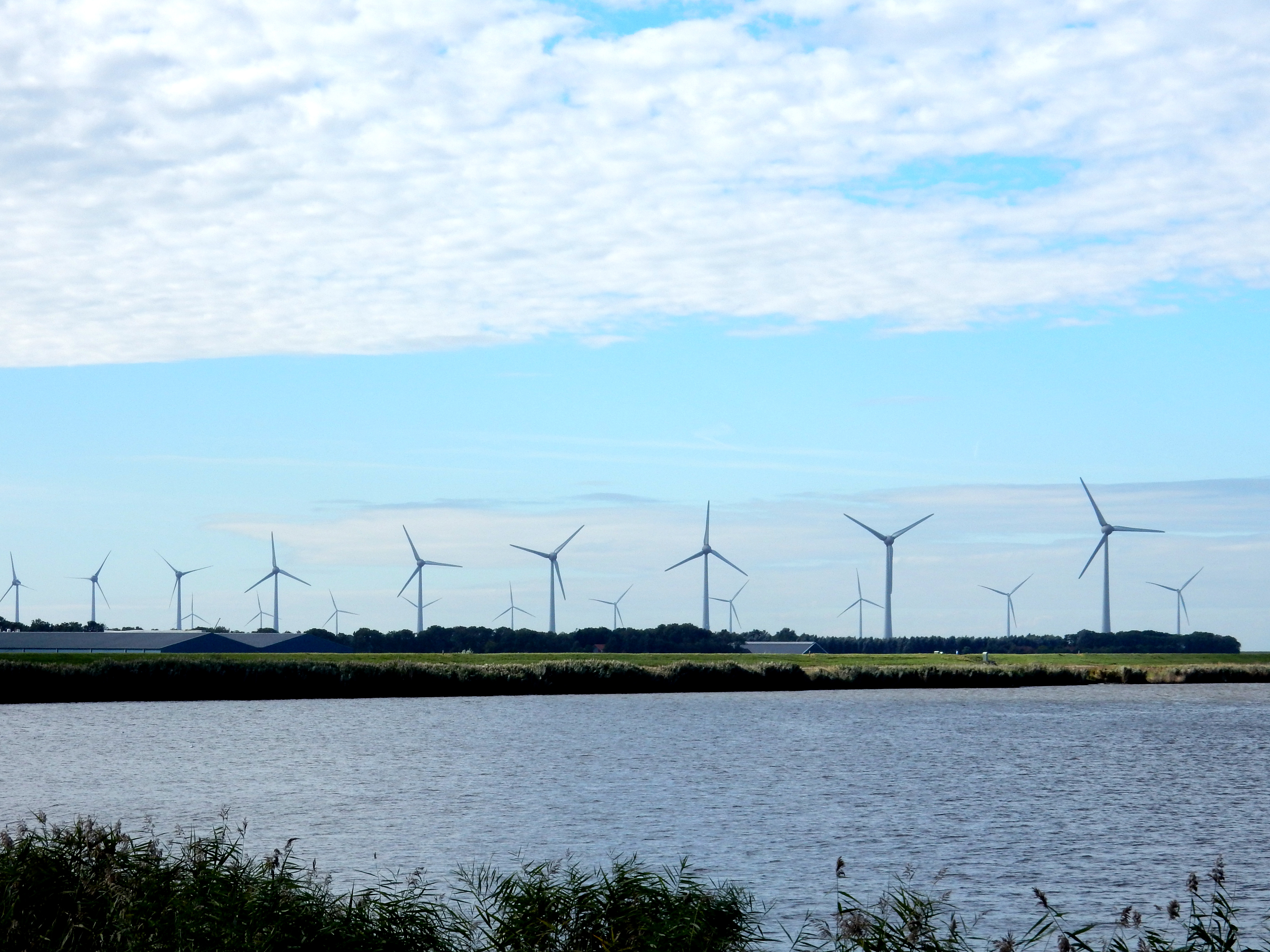 Windmolenpark Noordoostpolder gezien vanaf de dijk bij gemaal Lemmer